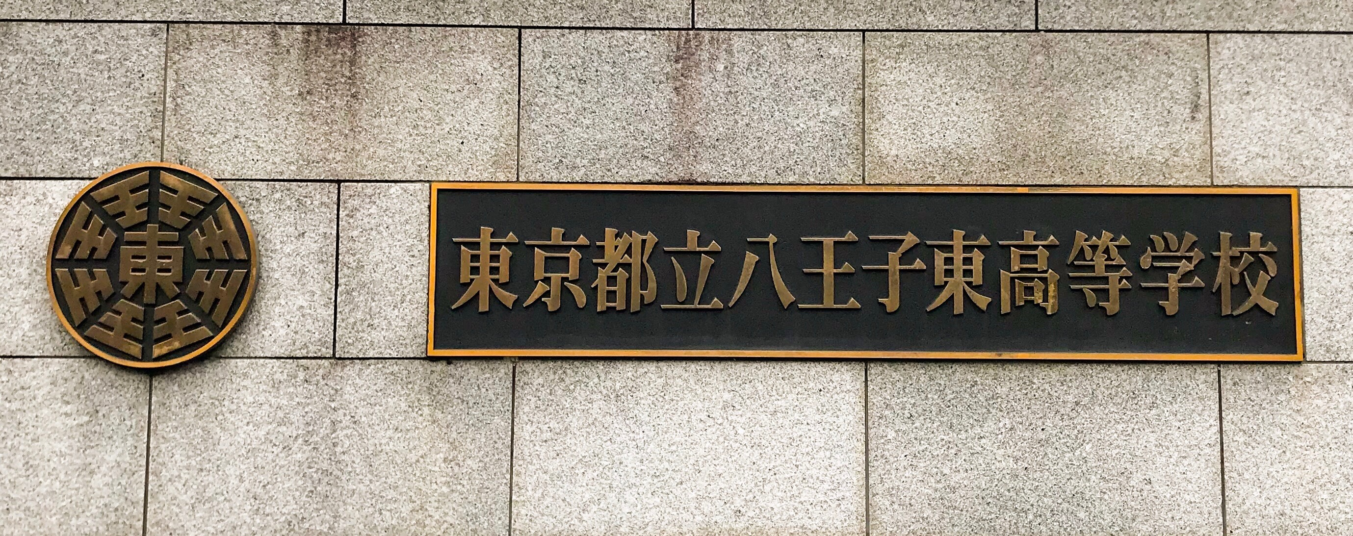 2019年3月1日、当該箇所を正面から撮影